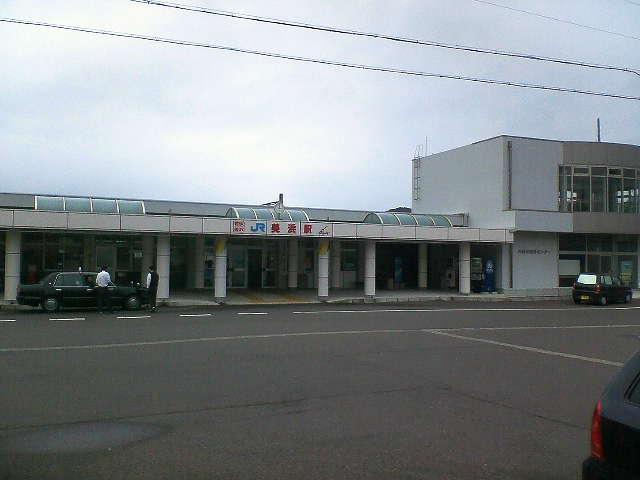 小浜線美浜駅（福井県三方郡美浜町）。2006年6月9日に投稿者が撮影。 駅舎手前の庇と写真右側の建物が後に増築されたもの。